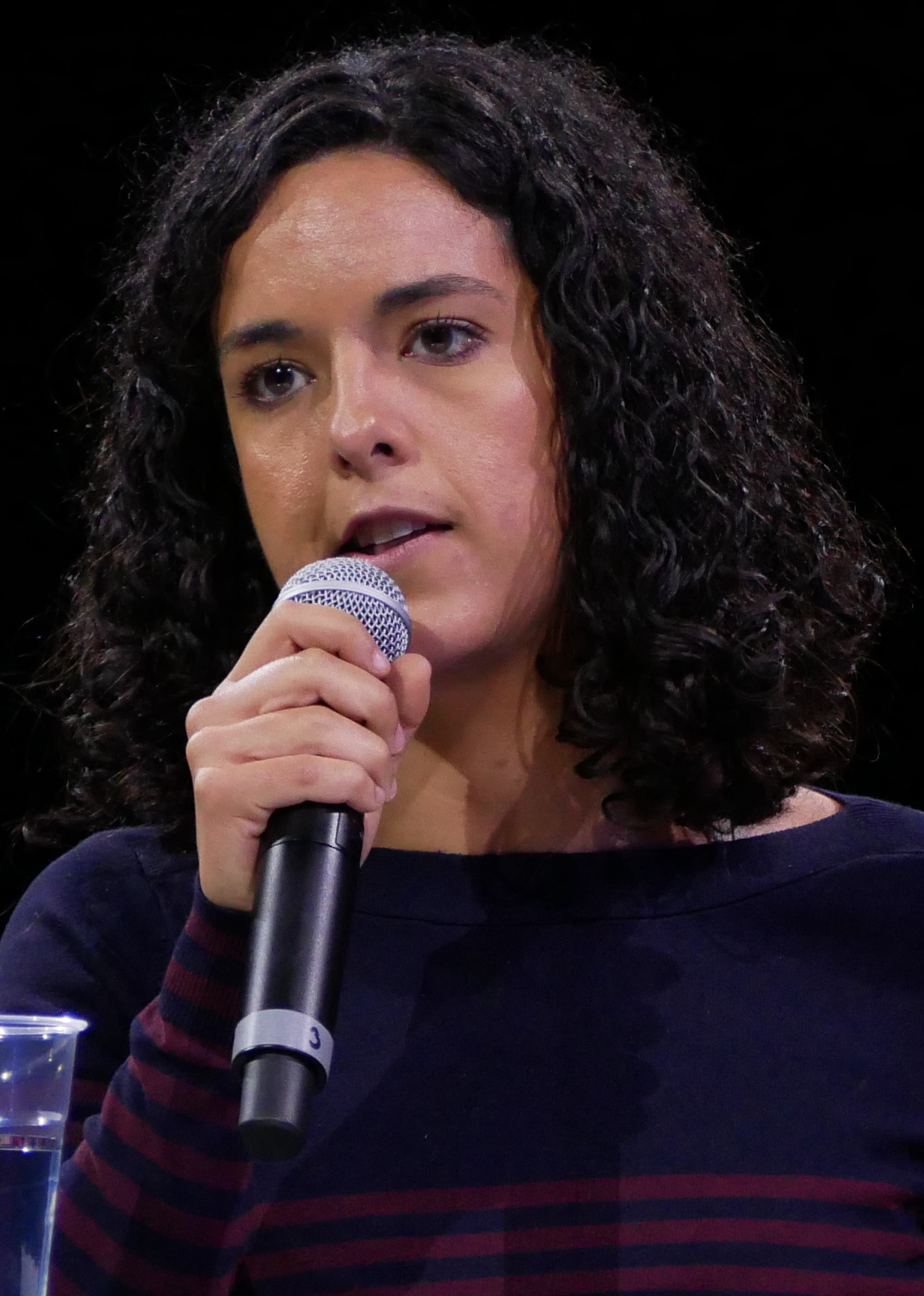 Discours de Manon Aubry lors de la Convention nationale de la France insoumise, le 9 décembre 2018 à Bordeaux. Depicted person: Manon Aubry – French politician woman, humanitarian and former swimmer